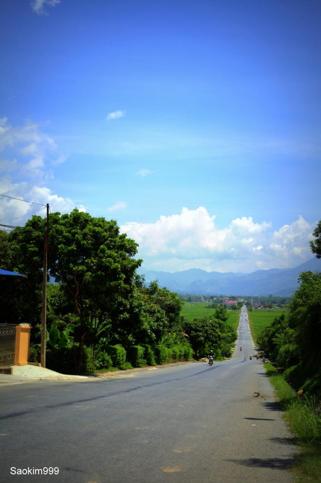 Cánh đồng Mường Lò - Nghĩa Lộ 2012